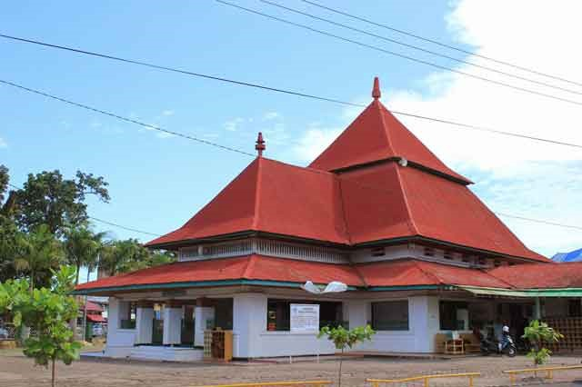 Masjid Jamik Bengkulu